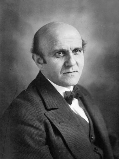 Grumbach, député (Haut-Rhin) : photographie de presse